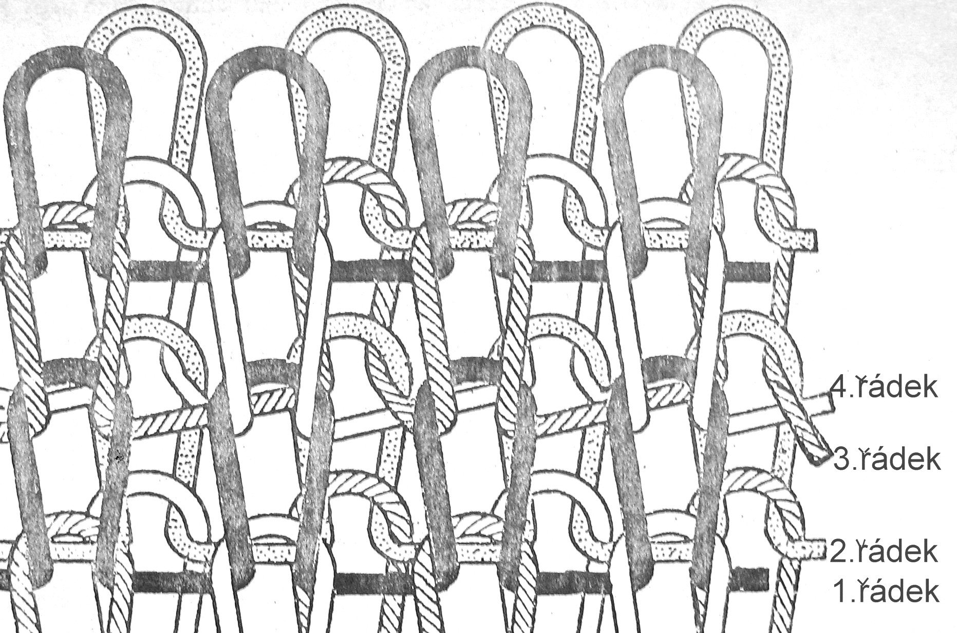 Schema: Maschenstruktur des Romanits